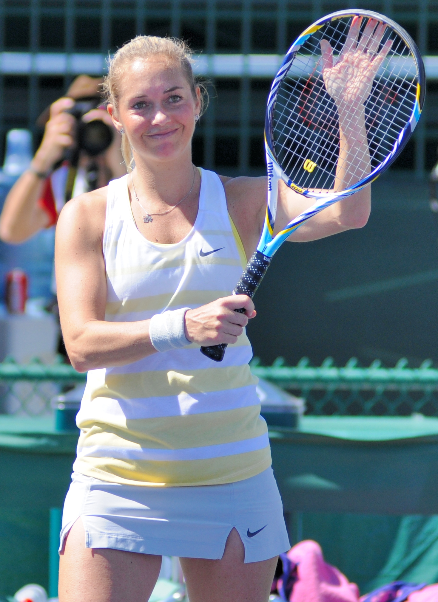 BNP Paribas Open 2013